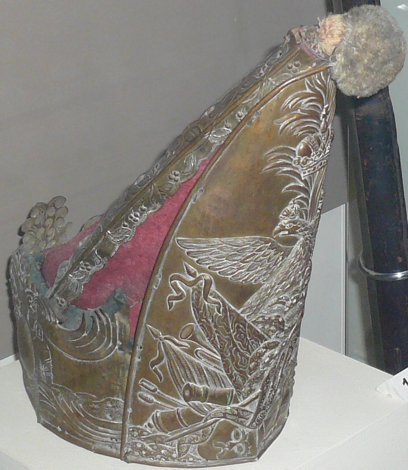 Гренадерка. Музей истории Азербайджана, Баку.